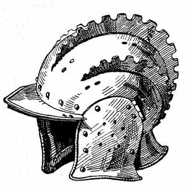 Иллюстрация из "Энциклопедии оружия" Вендалена Бехайма.